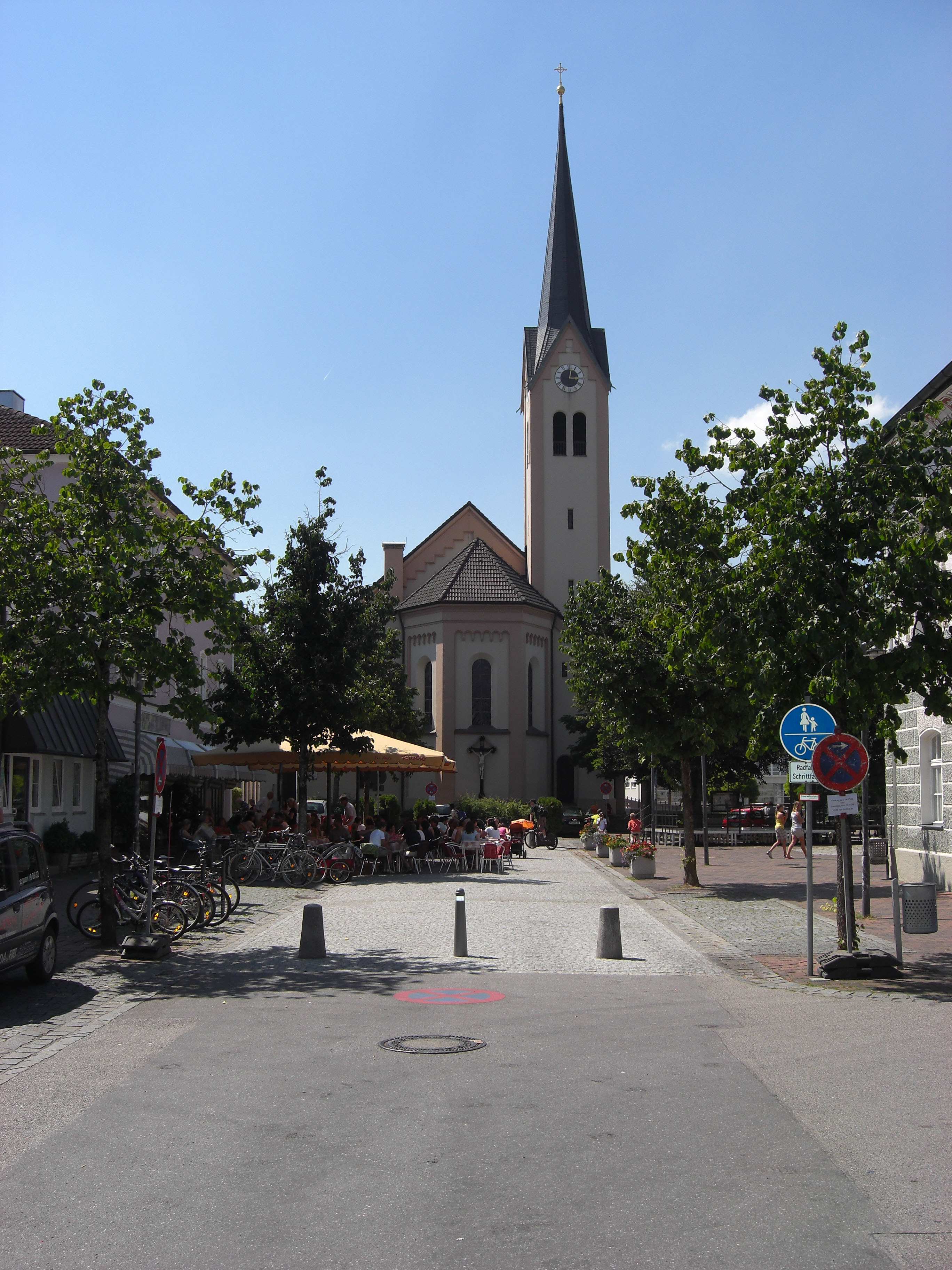 Die größte Kirche in der Stadtmitte von Kolbermoor am alten Rathausplatz.